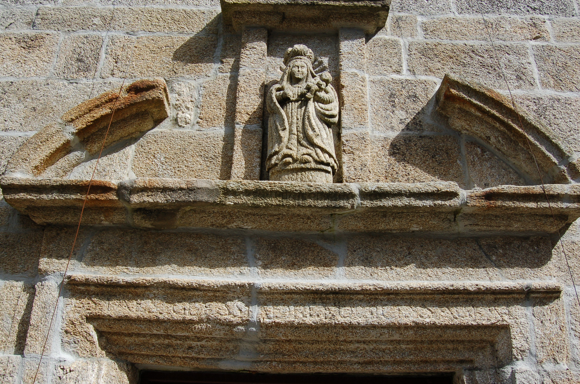 Imaxe e inscrición na igrexa parroquial de Santa María de Nieva, no concello de Avión